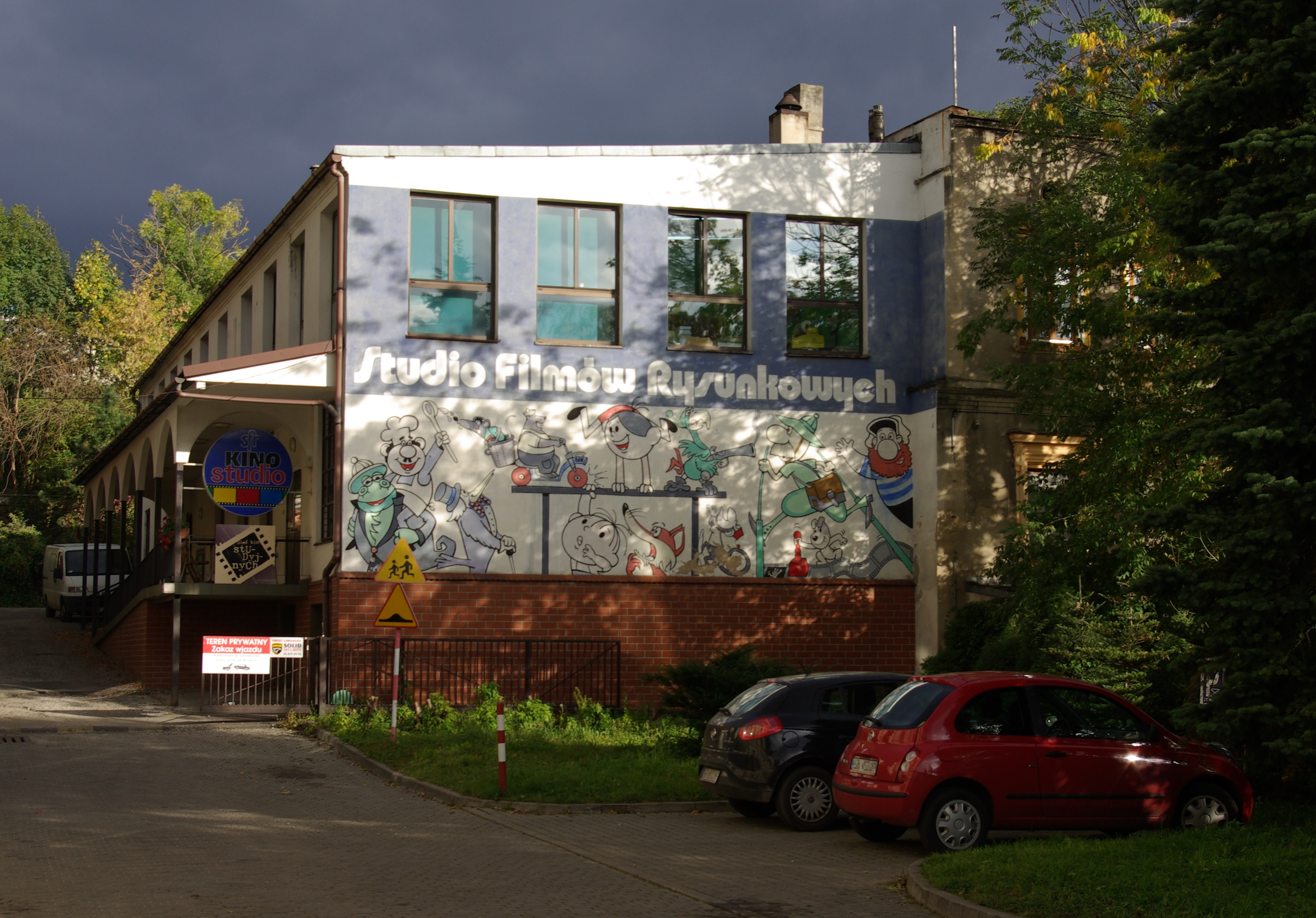 Studio Filmów Rysunkowych w Bielsku-Białej